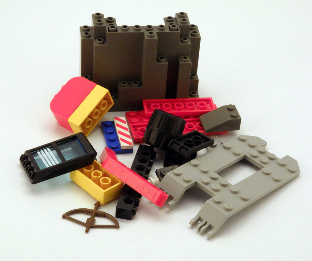 Klocki Lego - elementy z różnych zestawów